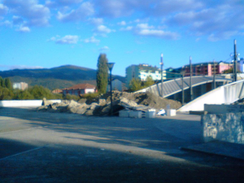 Барикаде код моста на Ибру у Косовској Митровици. (сликано 17.11.2011.) Licensing